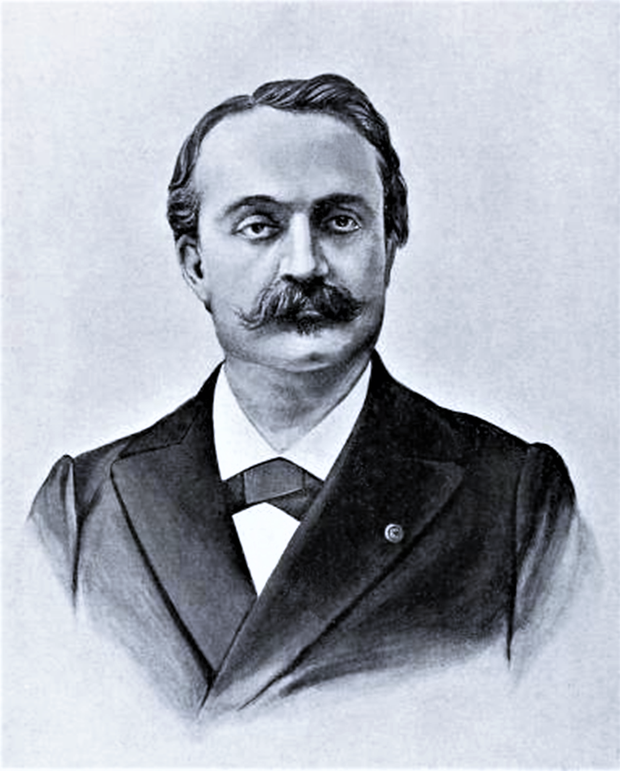 Maxime Cornu, (1843-1901), französischer Botaniker